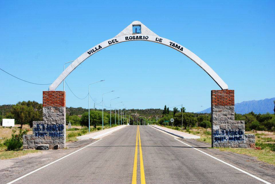 Arco de acceso a la localidad de Tama